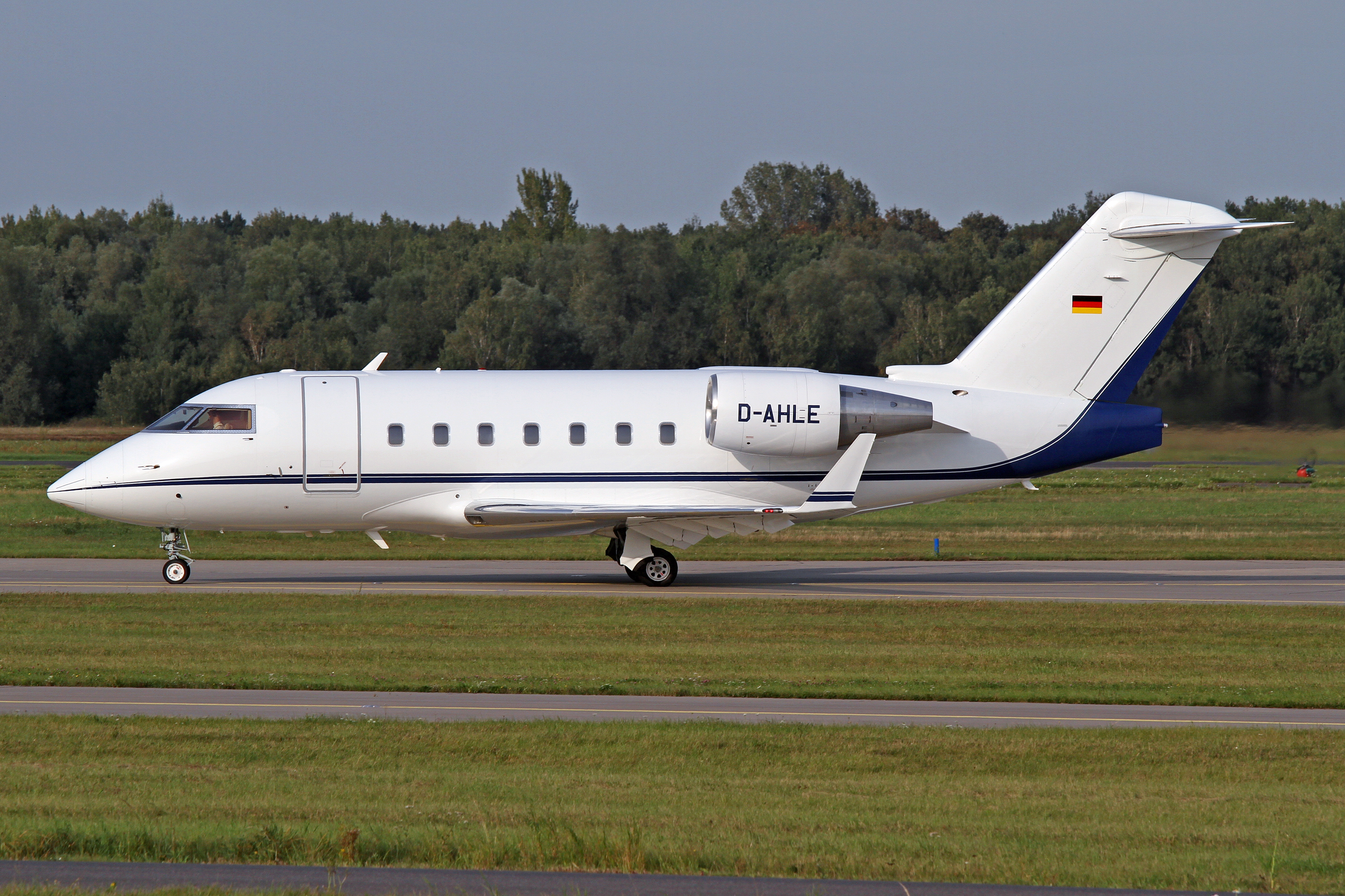 IMG_2702X